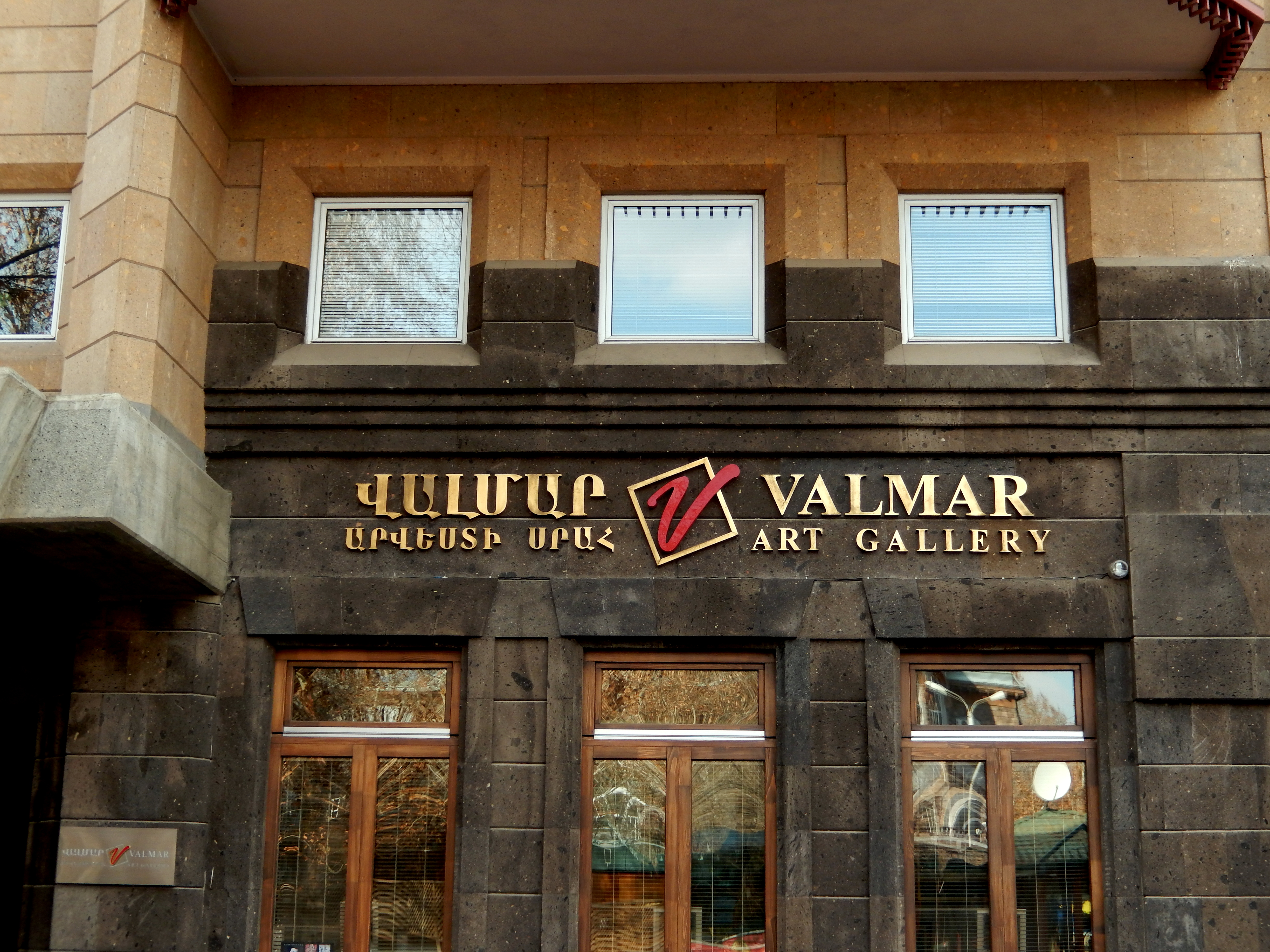 ք. Երևան, Փավստոս Բուզանդի փող. 53-55